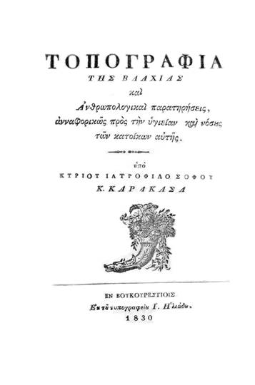 Η σελίδα τίτλου του βιβλίου του Κ. Καρακάση